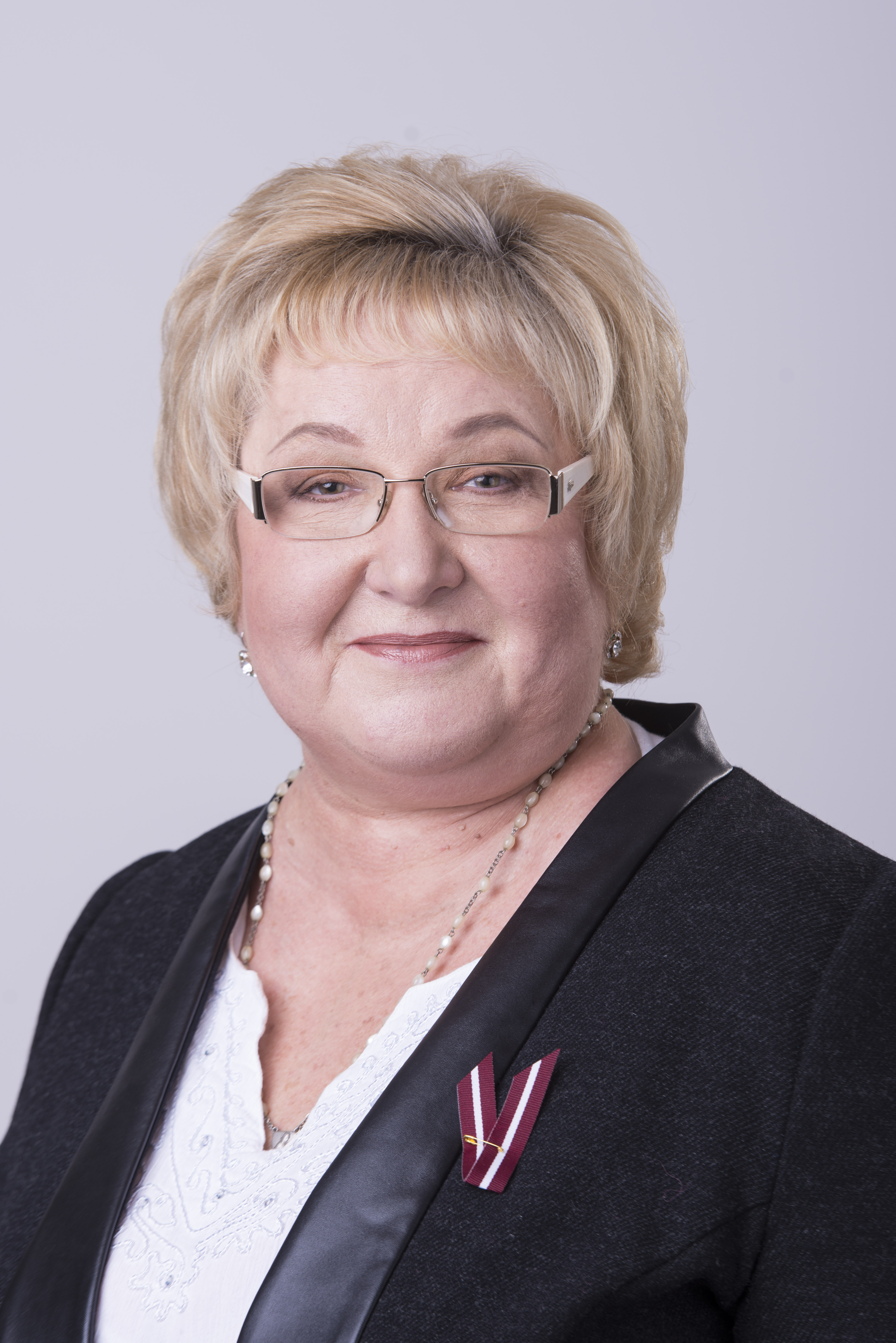 2014.gada 9.decembris. 12.Saeimas deputāte Silvija Šimfa. Foto: Reinis Inkēns, Saeimas Kanceleja Izmantošanas noteikumi: saeima.lv/lv/autortiesibas